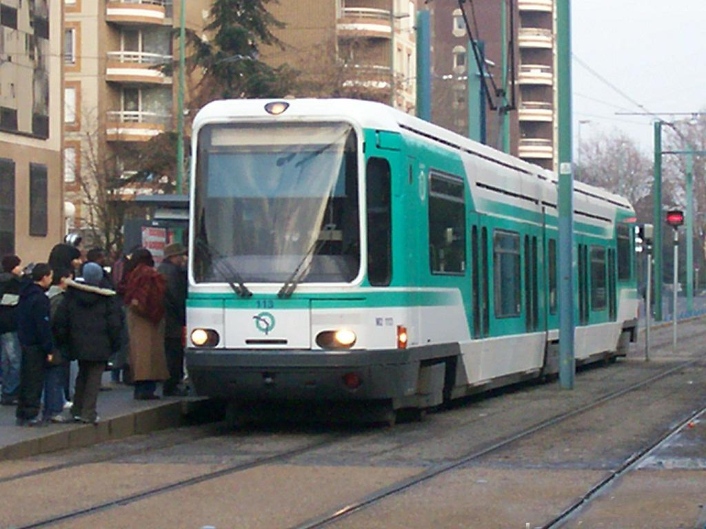 Rame du T1 à la station Bobigny Pablo Picasso Métro 5